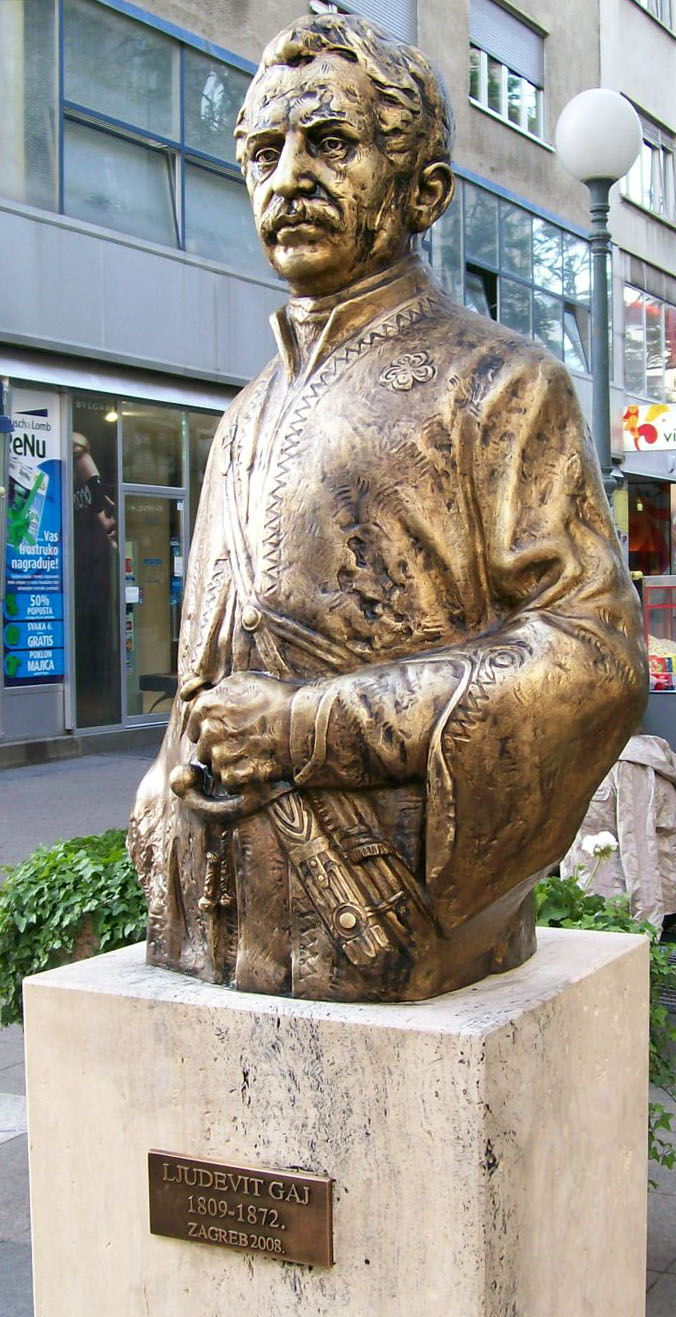 Spomenik Ljudevit Gaju u Zagrebu